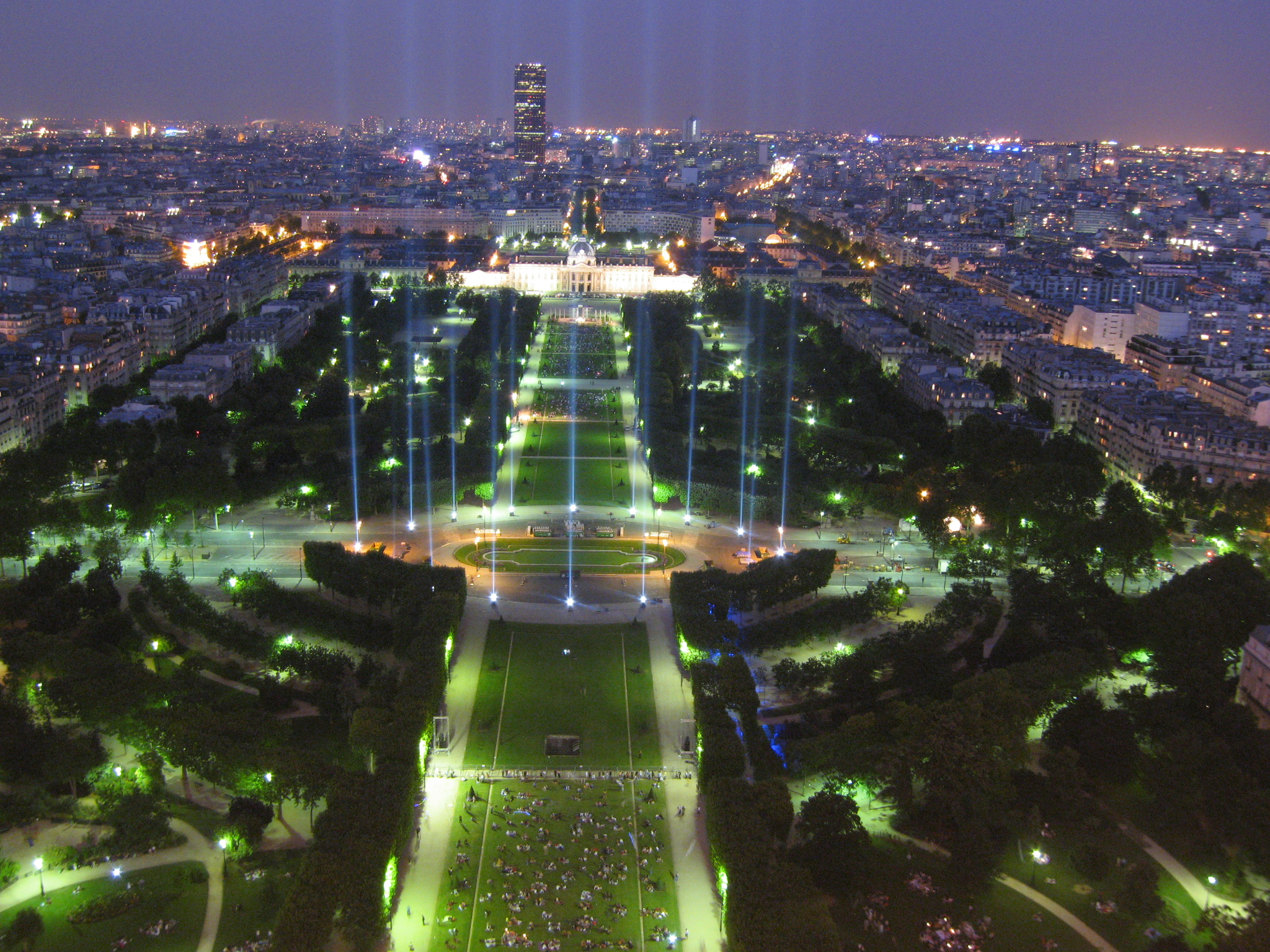 Champ-de-Mars vu de la Tour Eiffel